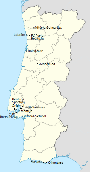 Carta dos clubes participantes do campeonato de portugal de futebol de primeira divisao 1973-1974